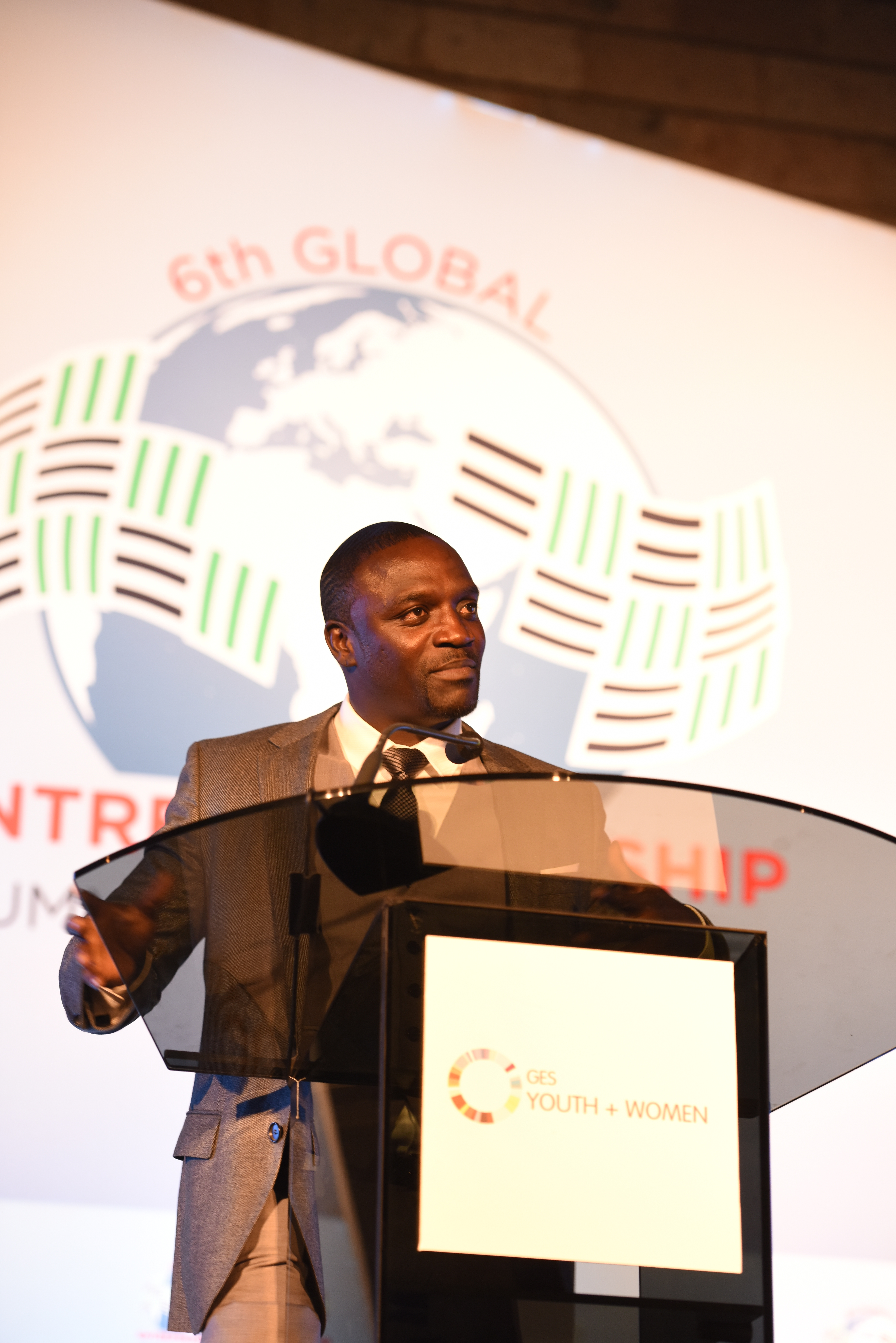 Akon foi convidado pela Embaixada dos EUA para celebrar o Dia da Mulher em 2015.